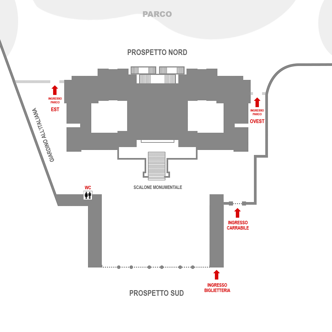 Disegno tecnico del Castello di Racconigi